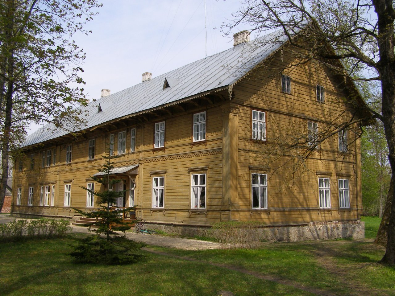 Võidula mõisa peahoone